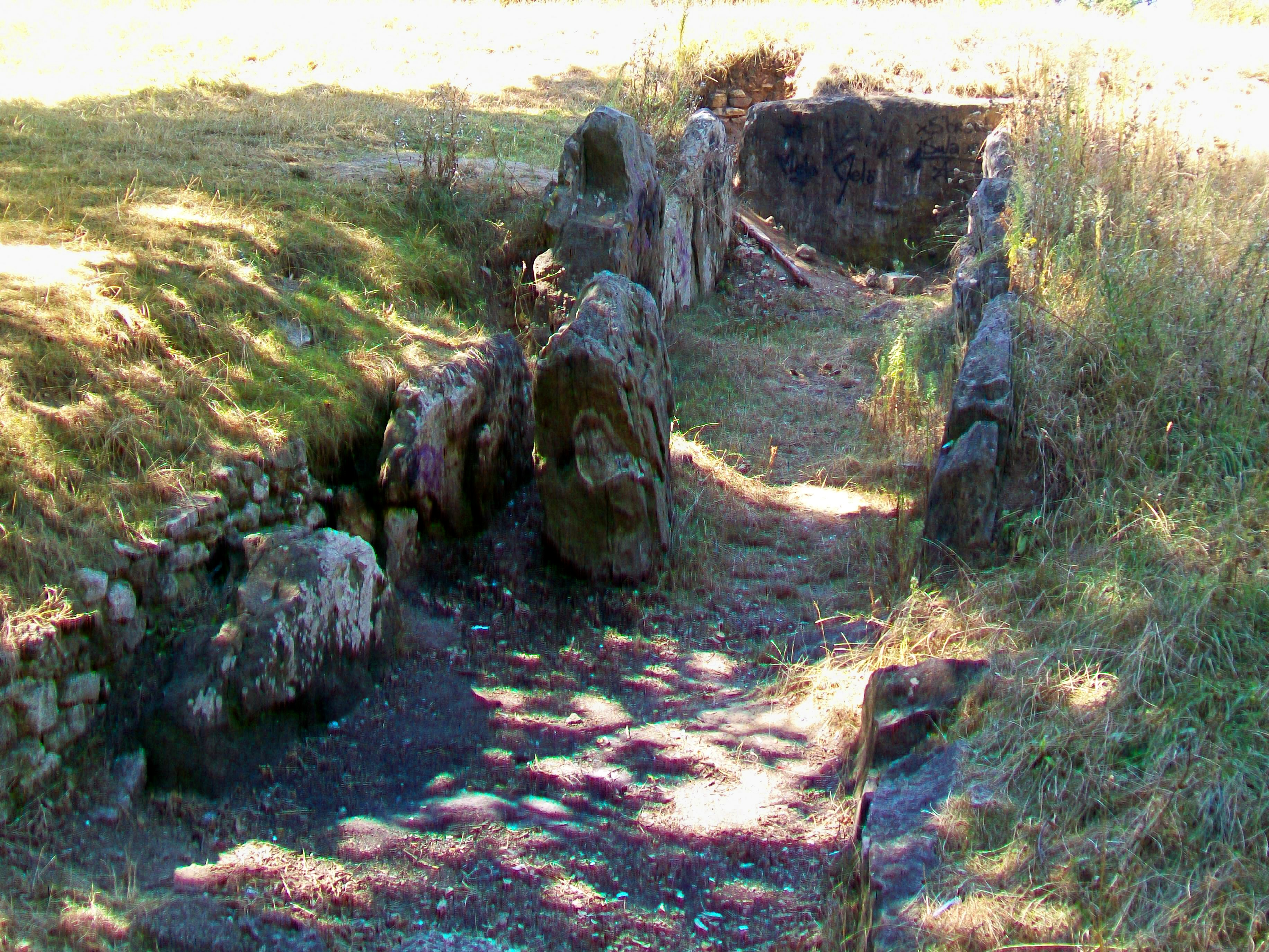 Vue depuis l'est (en direction de la ville nouvelle de Vauréal).